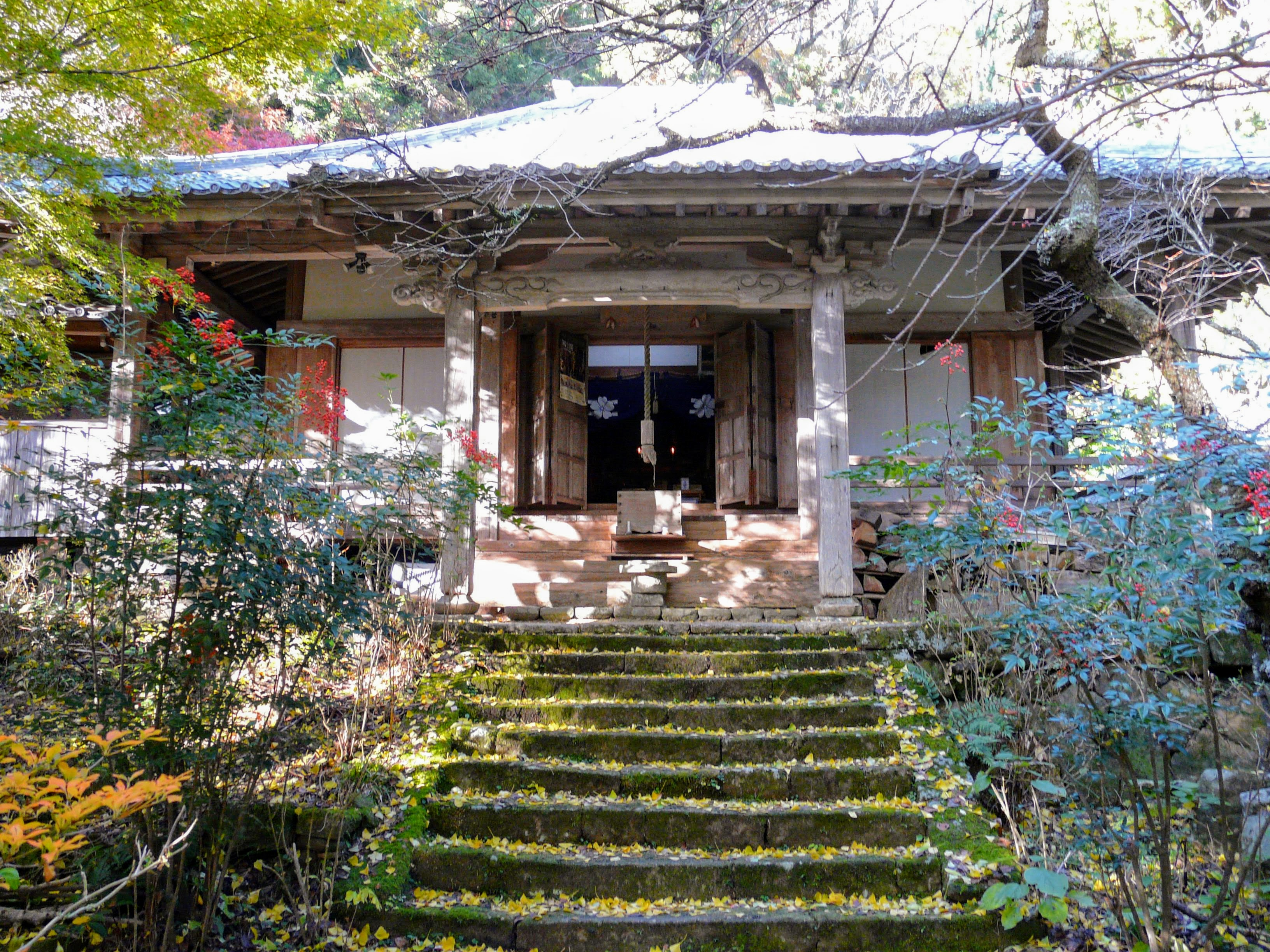 奈良県宇陀市榛原にある戒長寺本堂